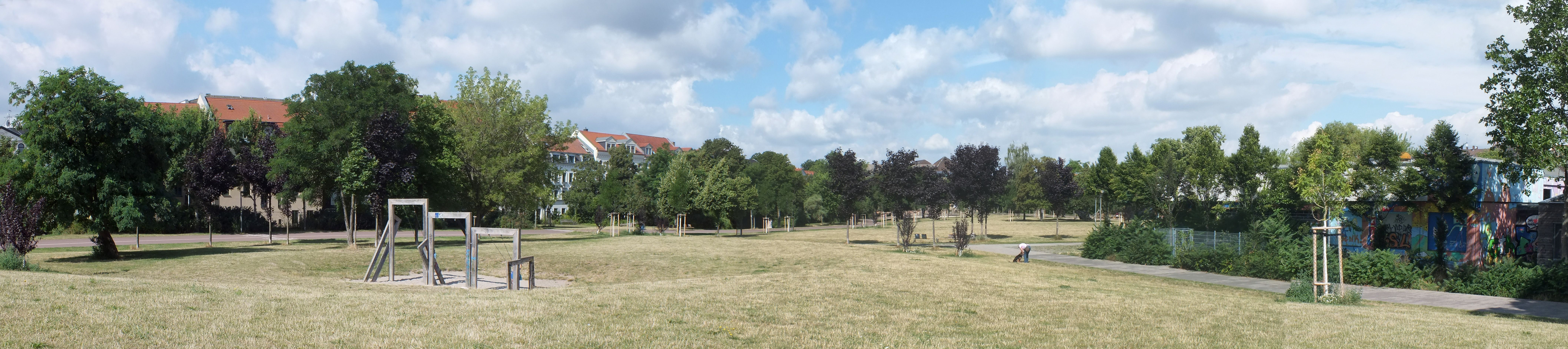 Panorama im Leipziger Stadtteilpark Rabet